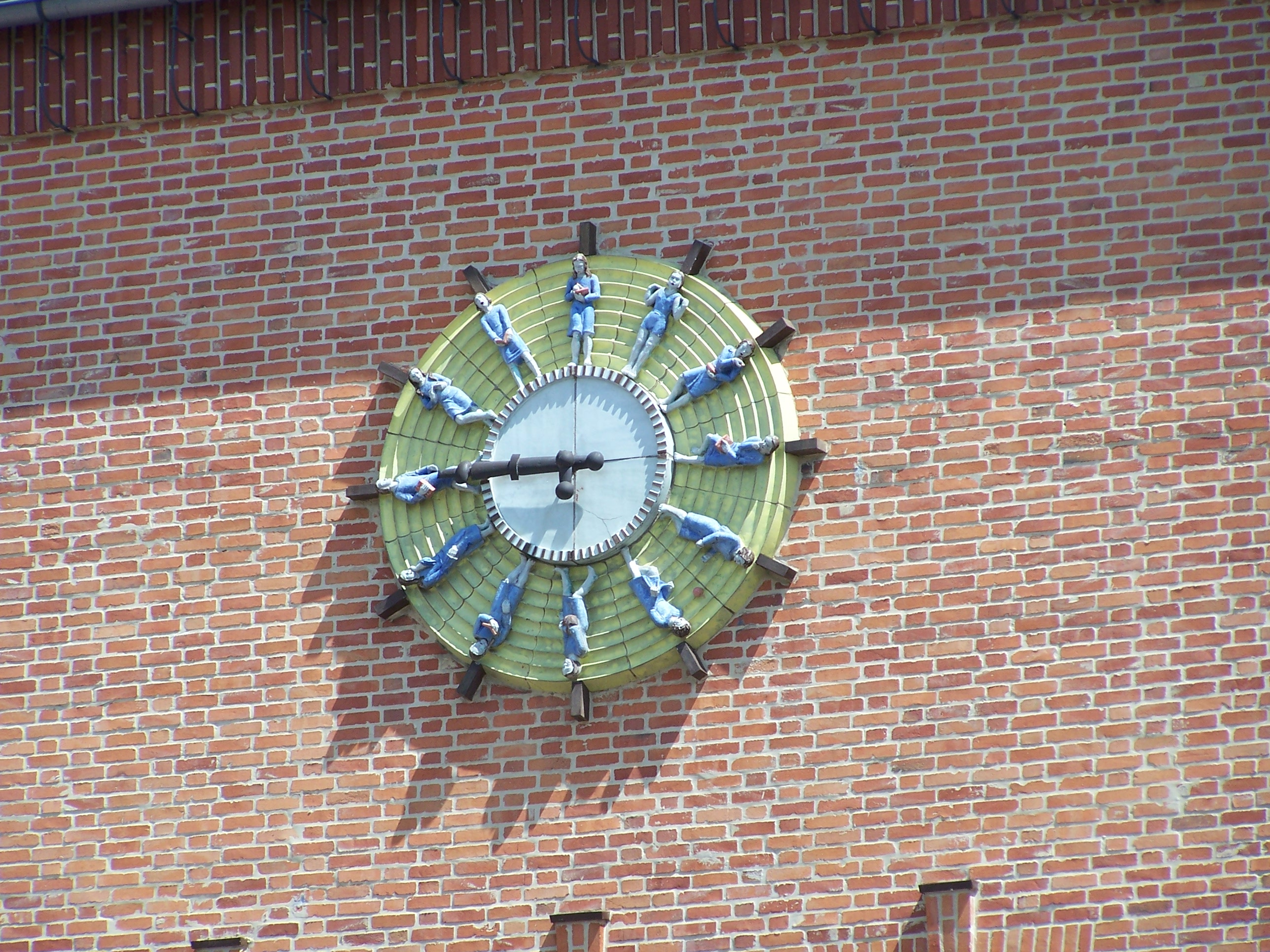 Uhr mit 12 Figuren an der Pestalozzischule in Halle (Saale)